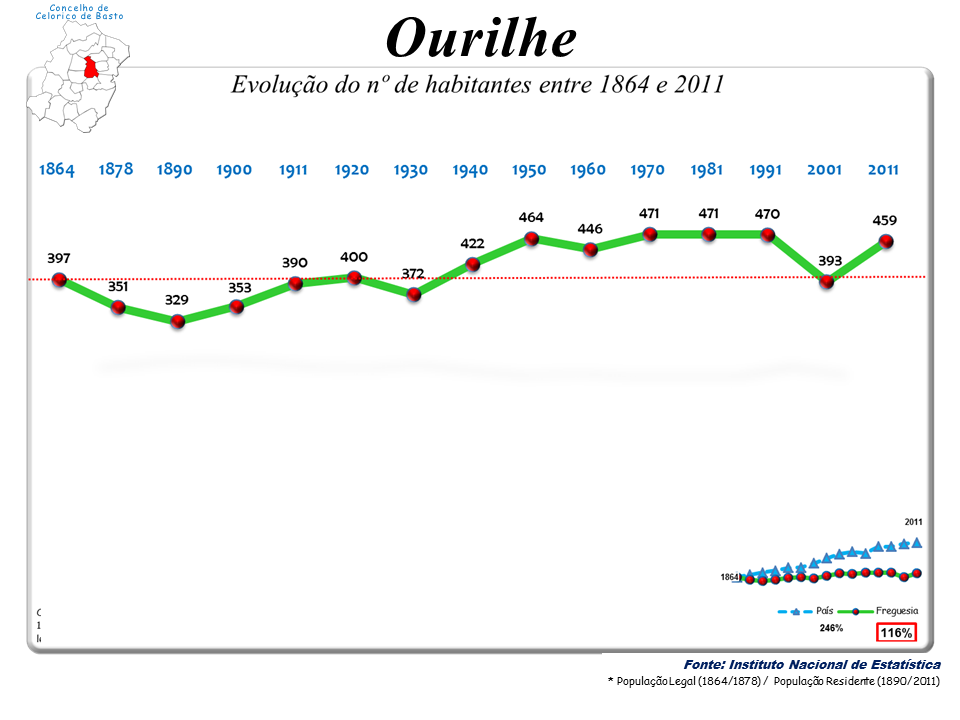 Censos 1864/2011